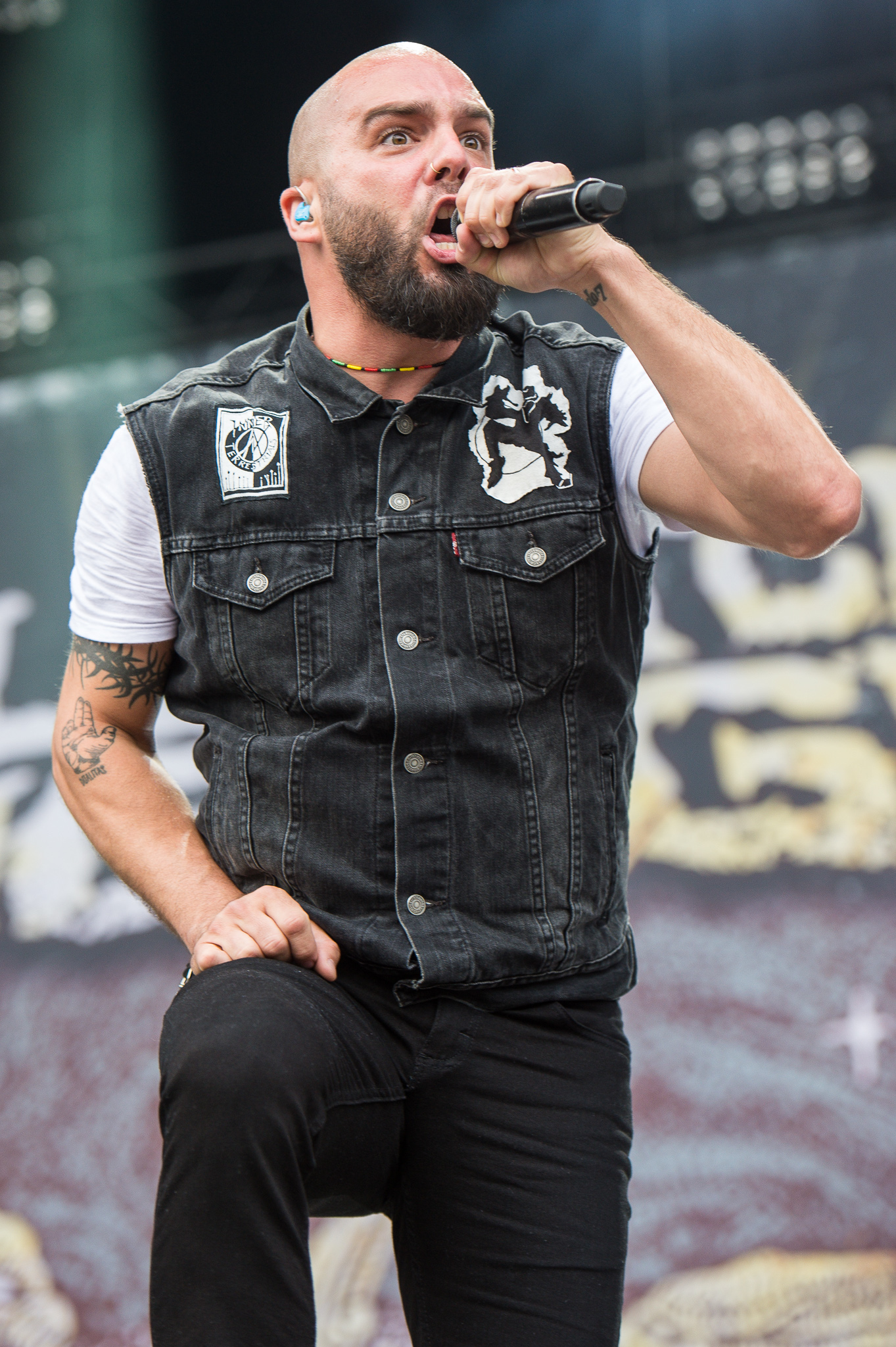 ARGO-Konzerte,Beck's Park Stage,Festival,Jesse Leach,Killswitch Engage,Konzert,Livekonzert,Livemusik,Musik,RiP,Rock im Park 2016